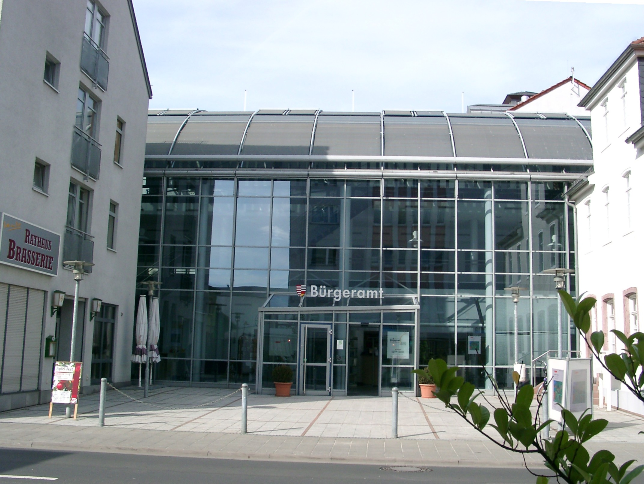 Neu-Isenburg, Bürgeramt